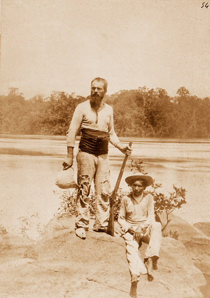 Jean Chaffanjon (né le 7 septembre 1854 à Arnas, mort le 7 décembre 1913 à Tjitlim, dans l'île de Bintang aux Indes néerlandaises), Expédition Orénoque